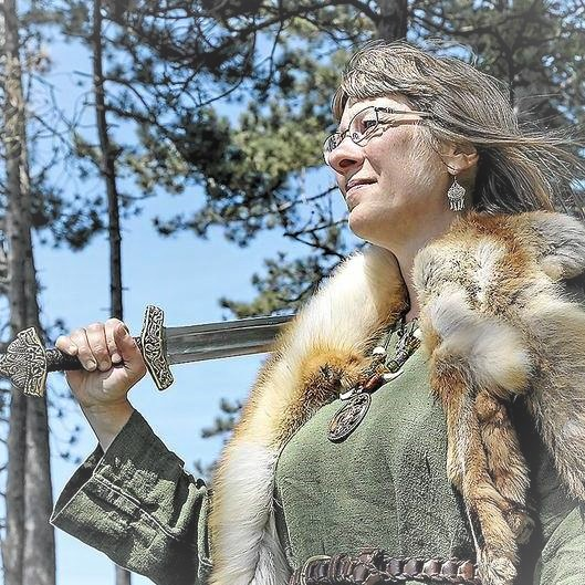 Forfatteren: Susanne Clod Pedersen